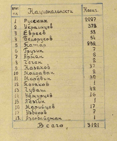 Численность и национальный состав 1 гв.омсбр начального формирования